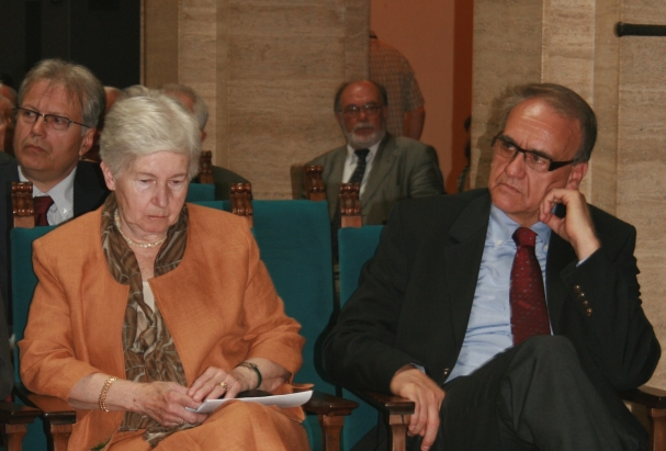 Koraljka Kos i Mirko Zelić, svečano proglašenje i predstavljanje novih članova Hrvatske akademije znanosti i umjetnosti u Zagrebu